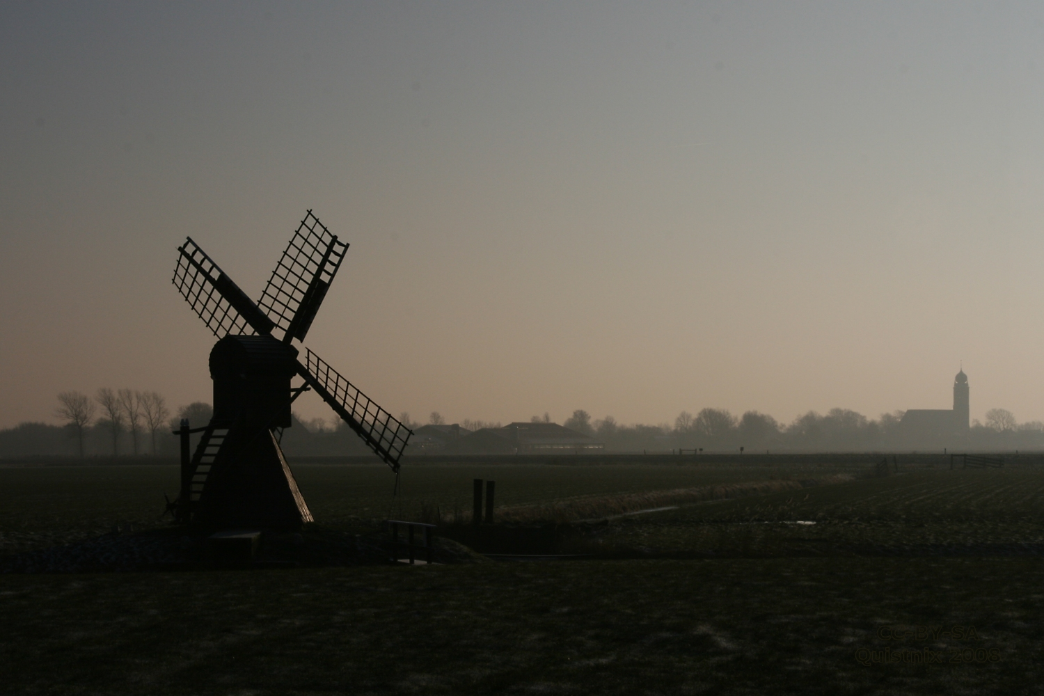 Marssum: molen Terpzigt met omgeving, tegenlicht